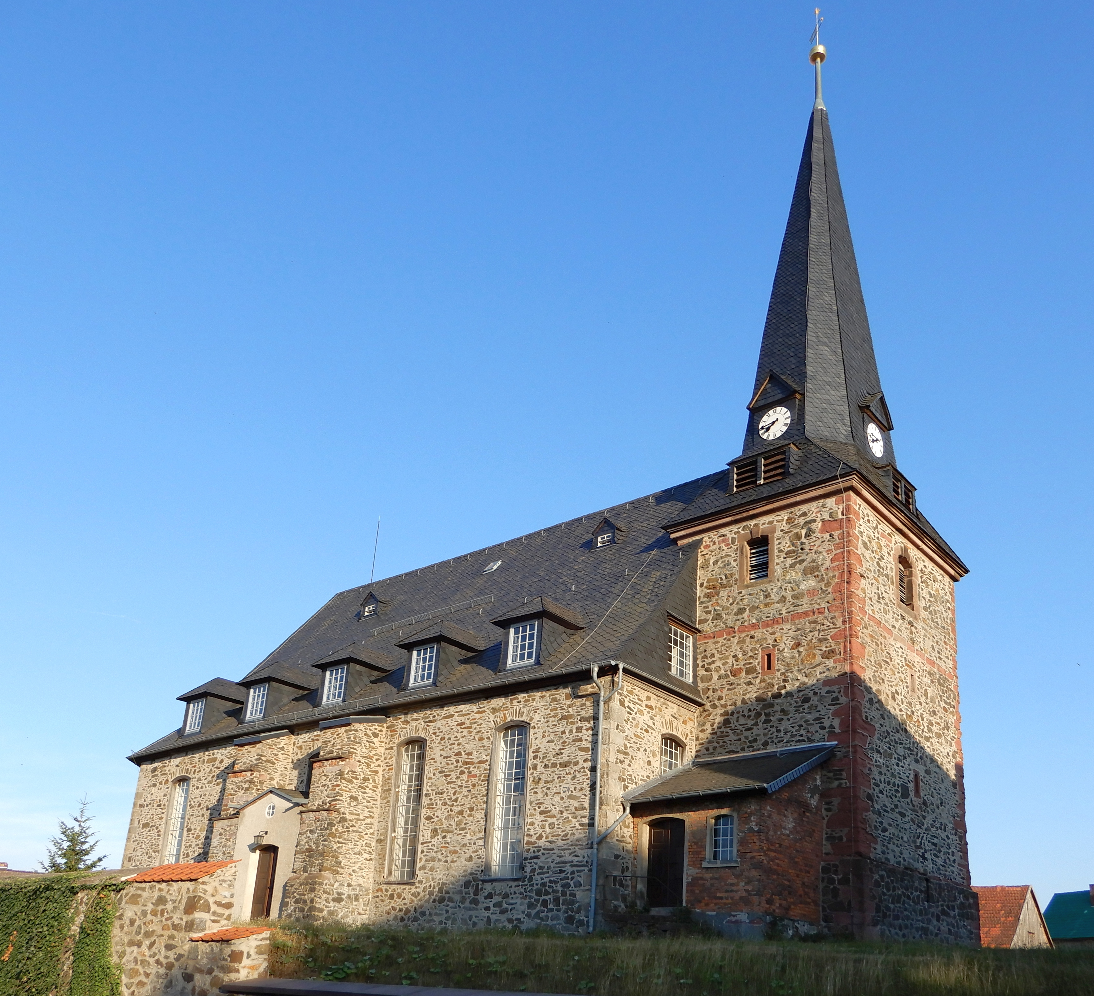 Kirche St. Andreas in Königerode